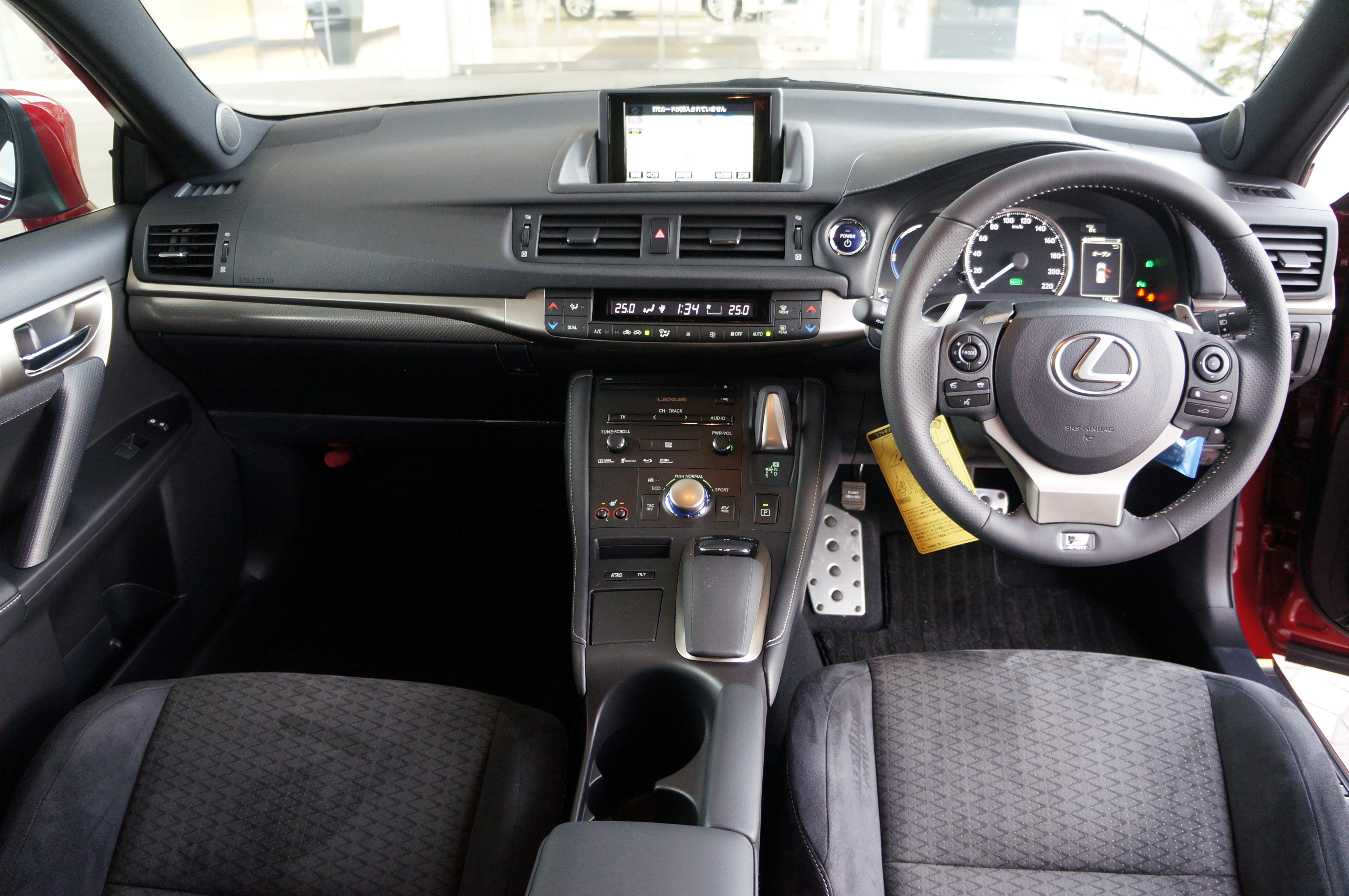 Lexus CT200h Fsport 2014